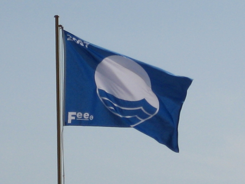 Plava zastava, Crikvenica, Hrvatska